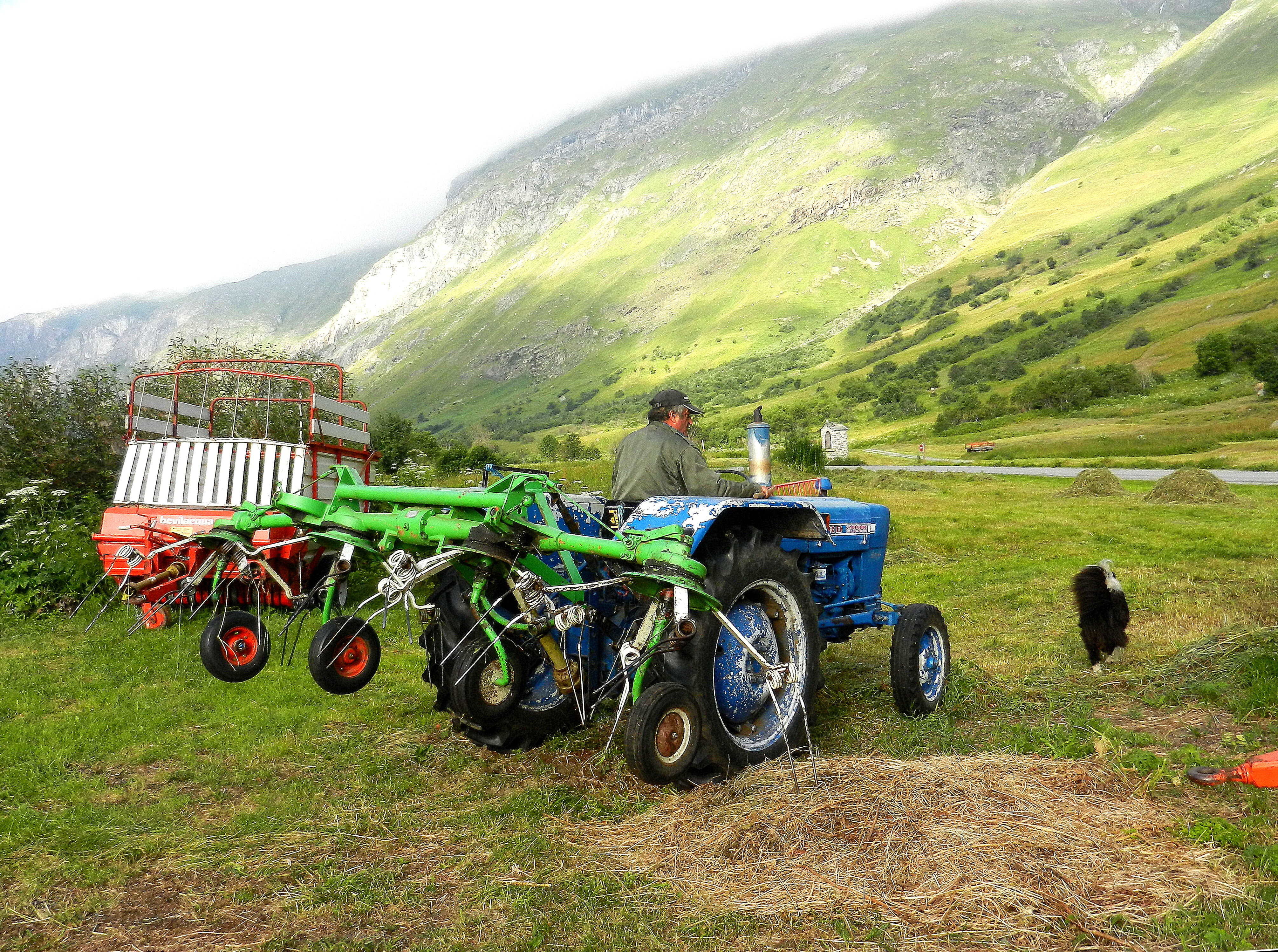 En Bonneval sur Arc, Francia, se trabaja la tierra en medio de un paisaje maravilloso.